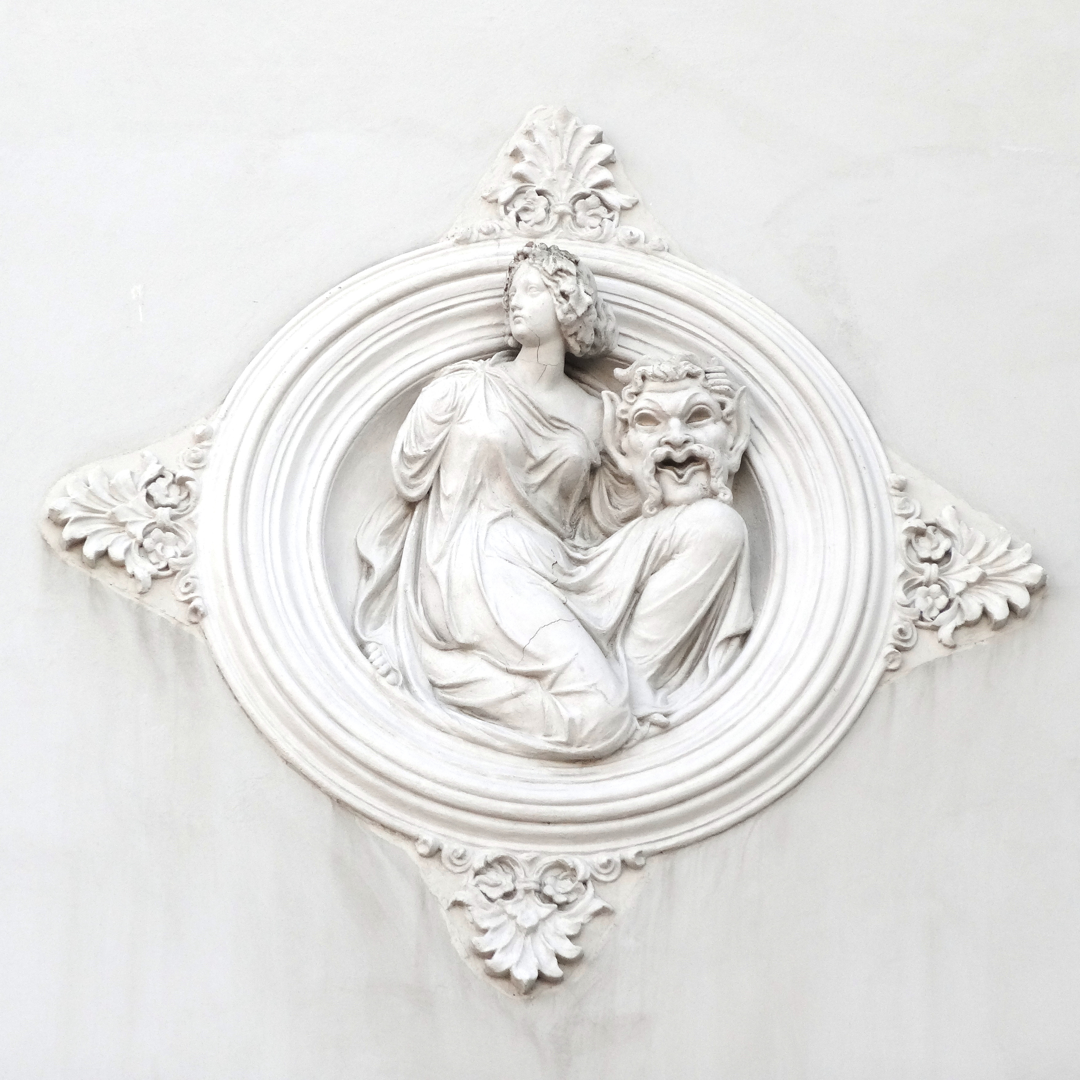 Stora Teatern i Göteborg, Kungsparken 1. En av de reliefer som pryder husets fasad.